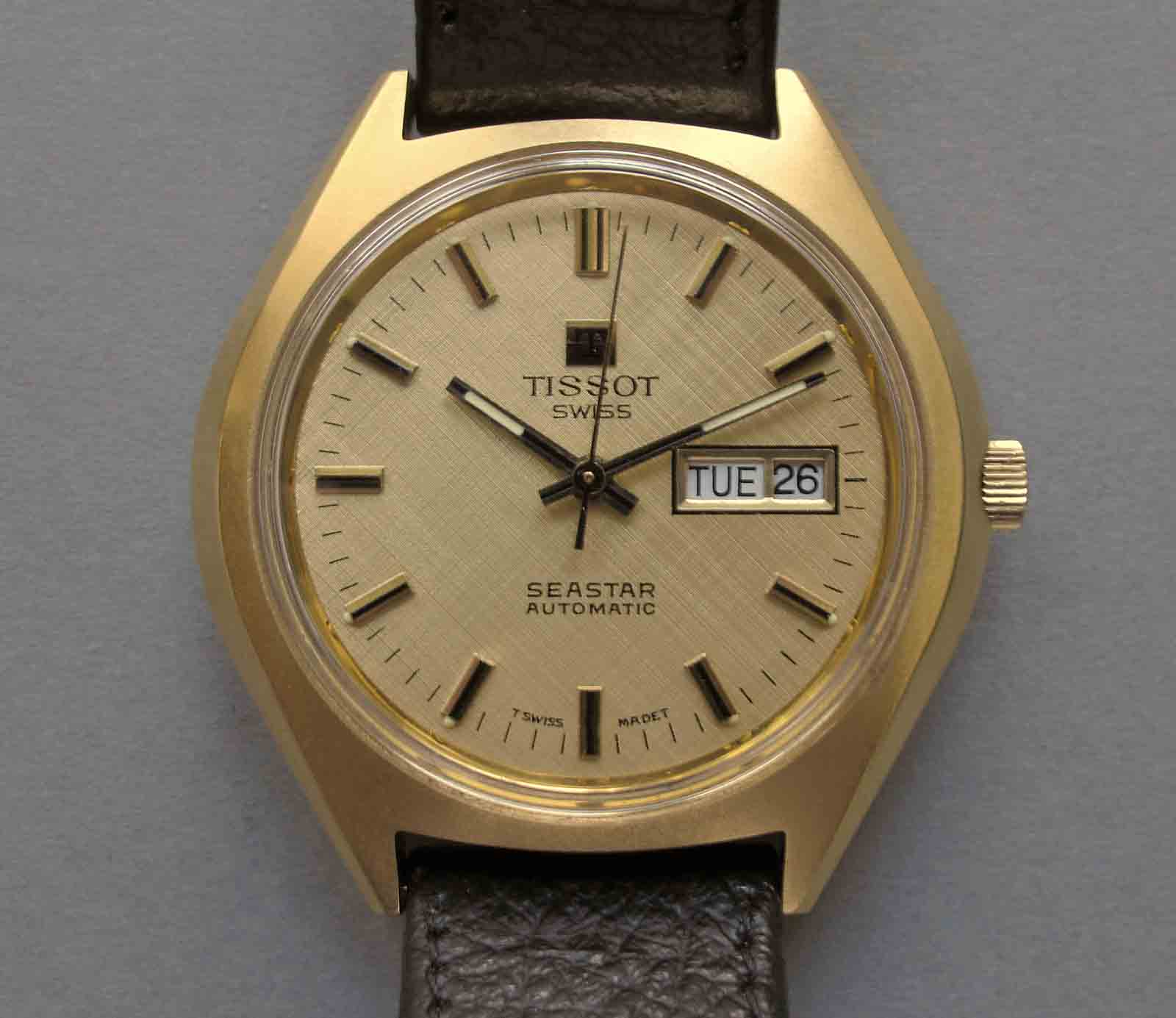 Tissot Seastar aus dem Jahr 1977 mit ca. 40mm Durchmesser (ohne Krone).